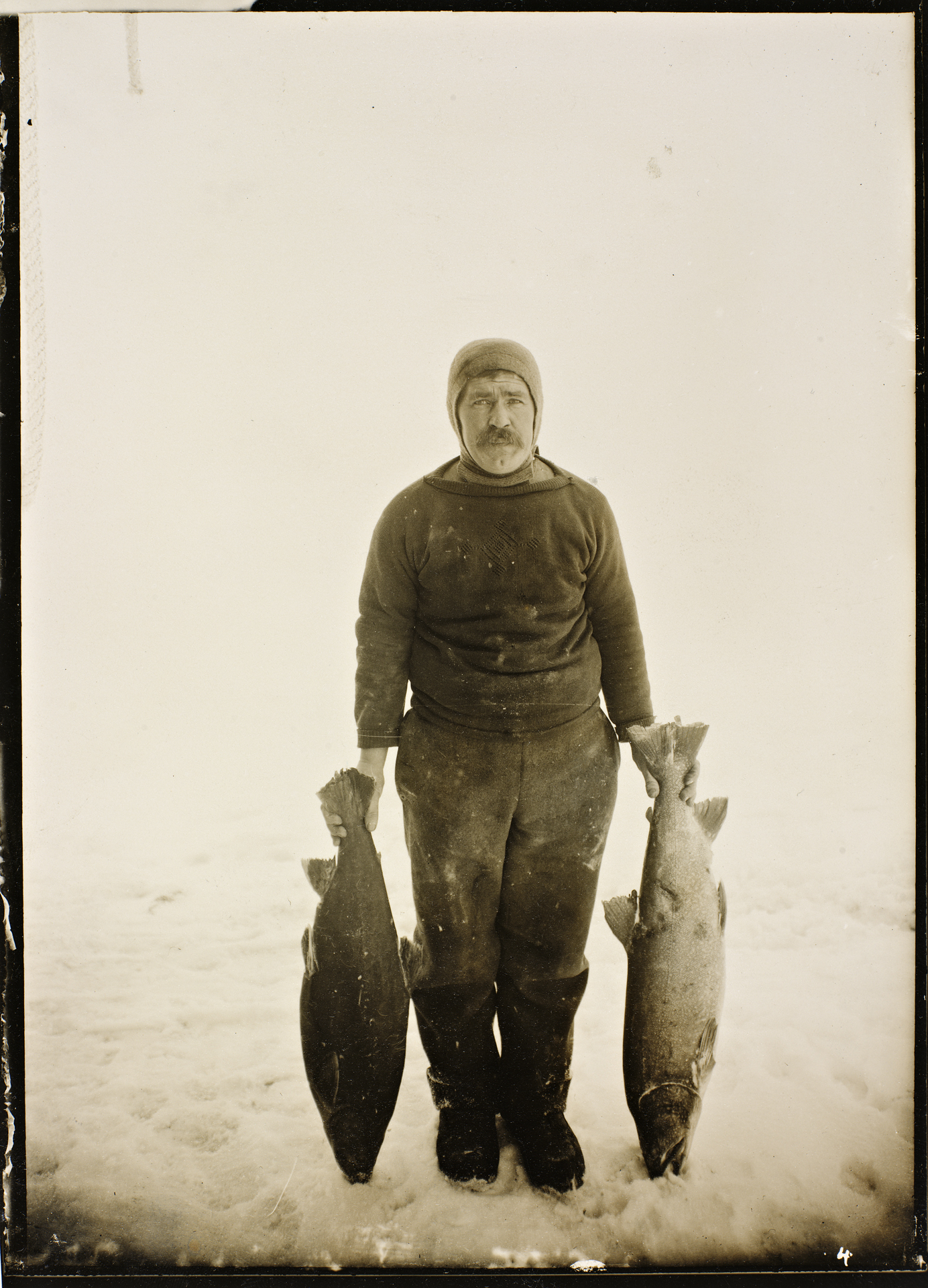 Adolf Lindstrøm (1866-1939) med prøver av fisken på King William Island, høsten 1904.